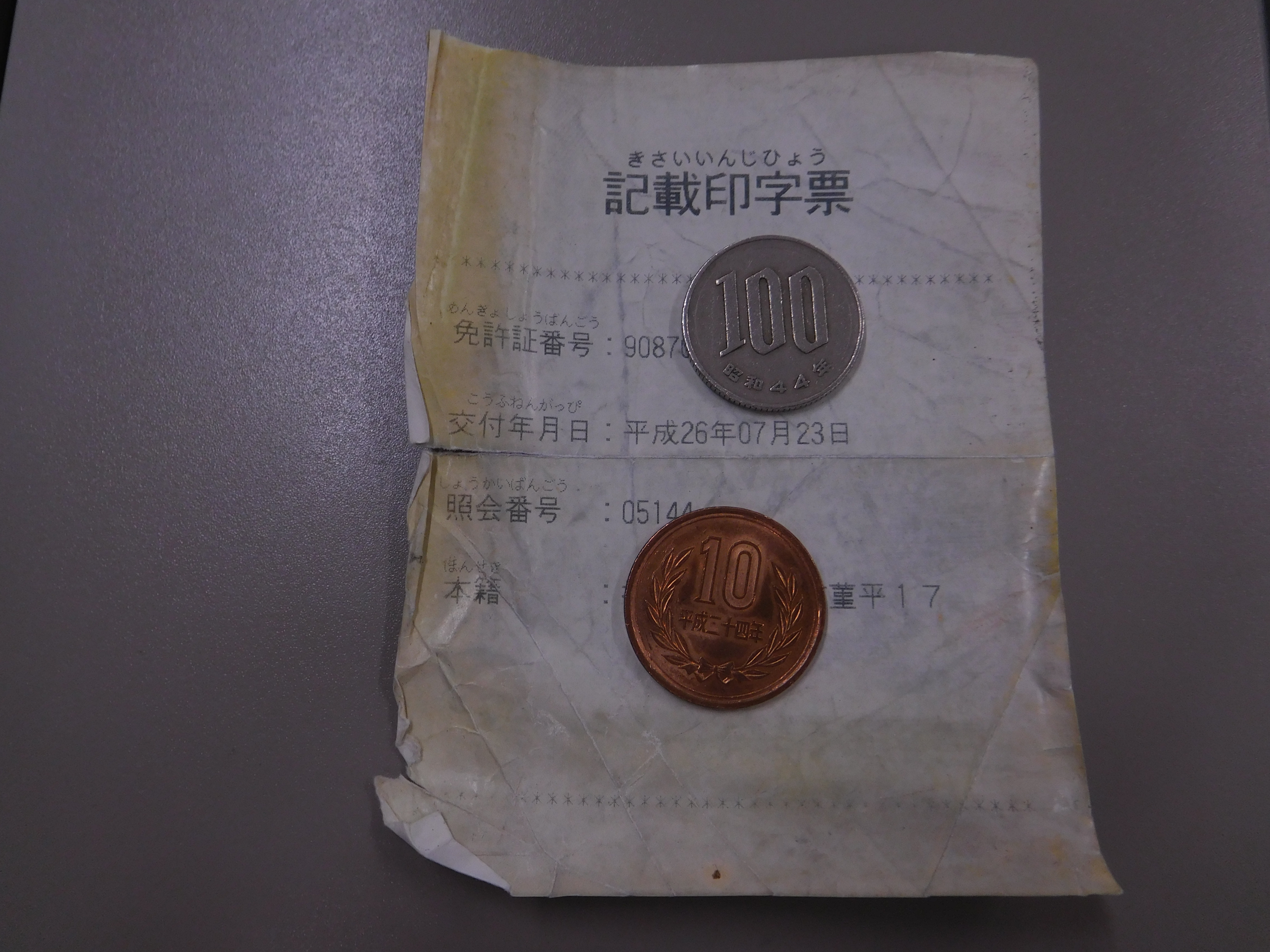 記載印字票の見本 感熱紙バージョン